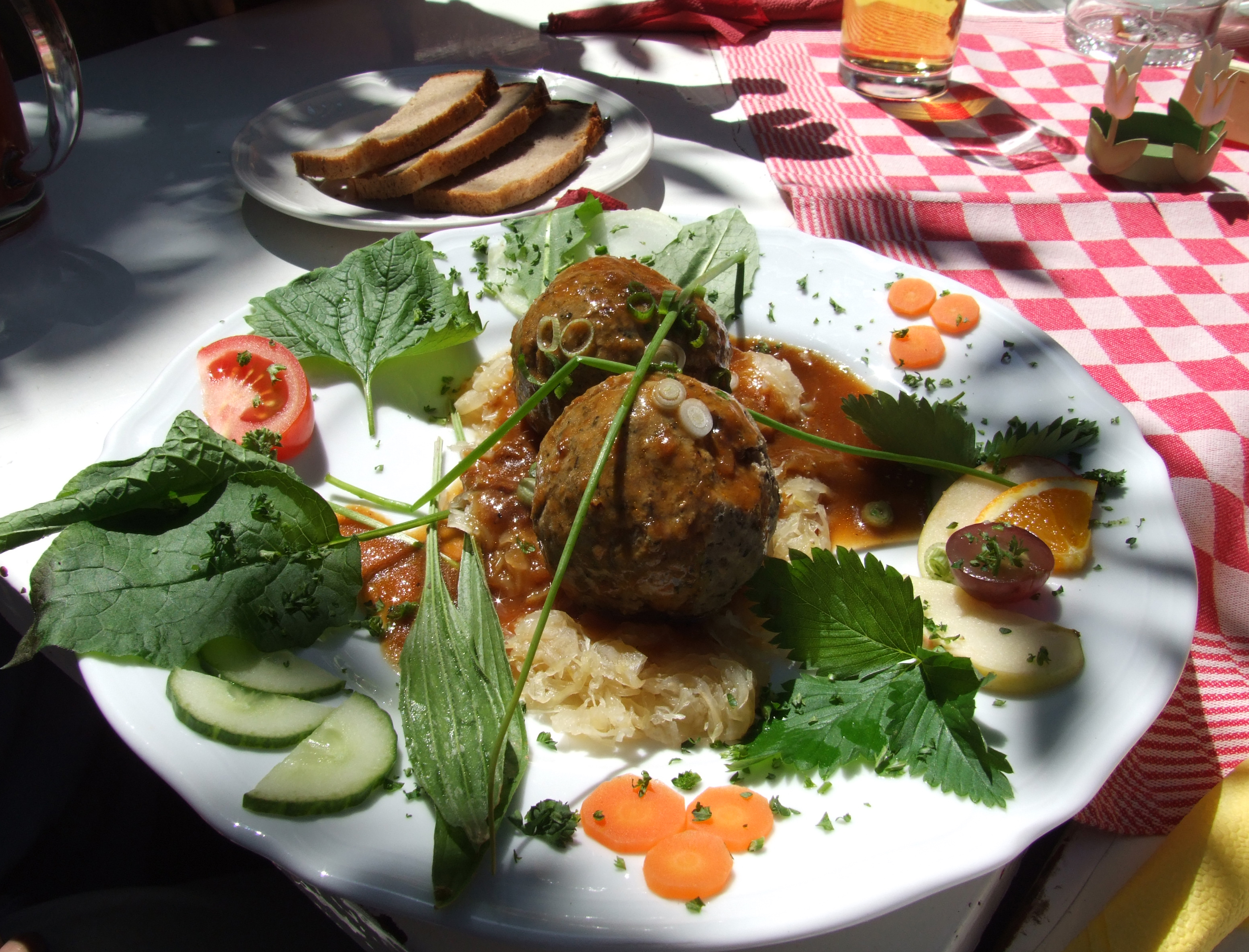 Leberknödel mit Sauerkraut, Pfälzer Küche, aufgenommen auf der Burg Berwartstein Pälzisch: Lewerknepp mit Sauerkraut